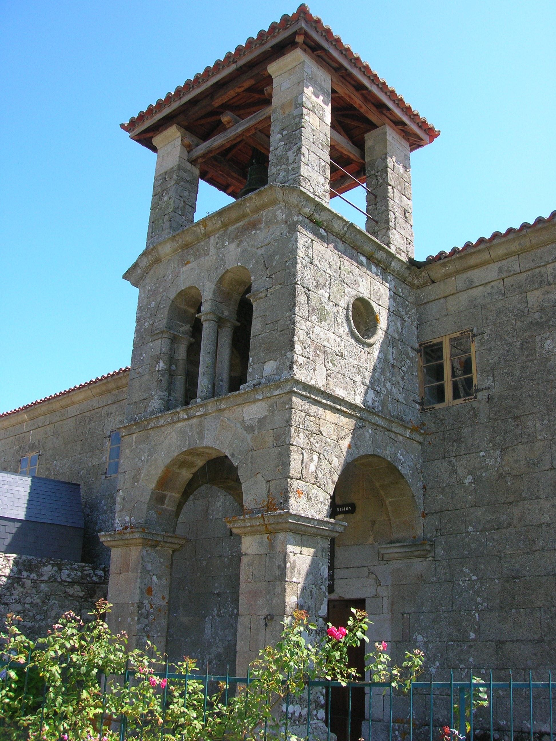 Torre campanario de la iglesia de San Miguel de Rosende (Sober). Reconstruida, conserva ciertos elementos románicos que atestiguan su pasado dependiente del monasterio de Estevo de Ribas de Sil (Parador Nacional), desde al menos el siglo XIII. Más info en *C. Rueda, F. Albo, La Voz de Galicia, 01/06/2006, "Piedras señoriales en Rosende"